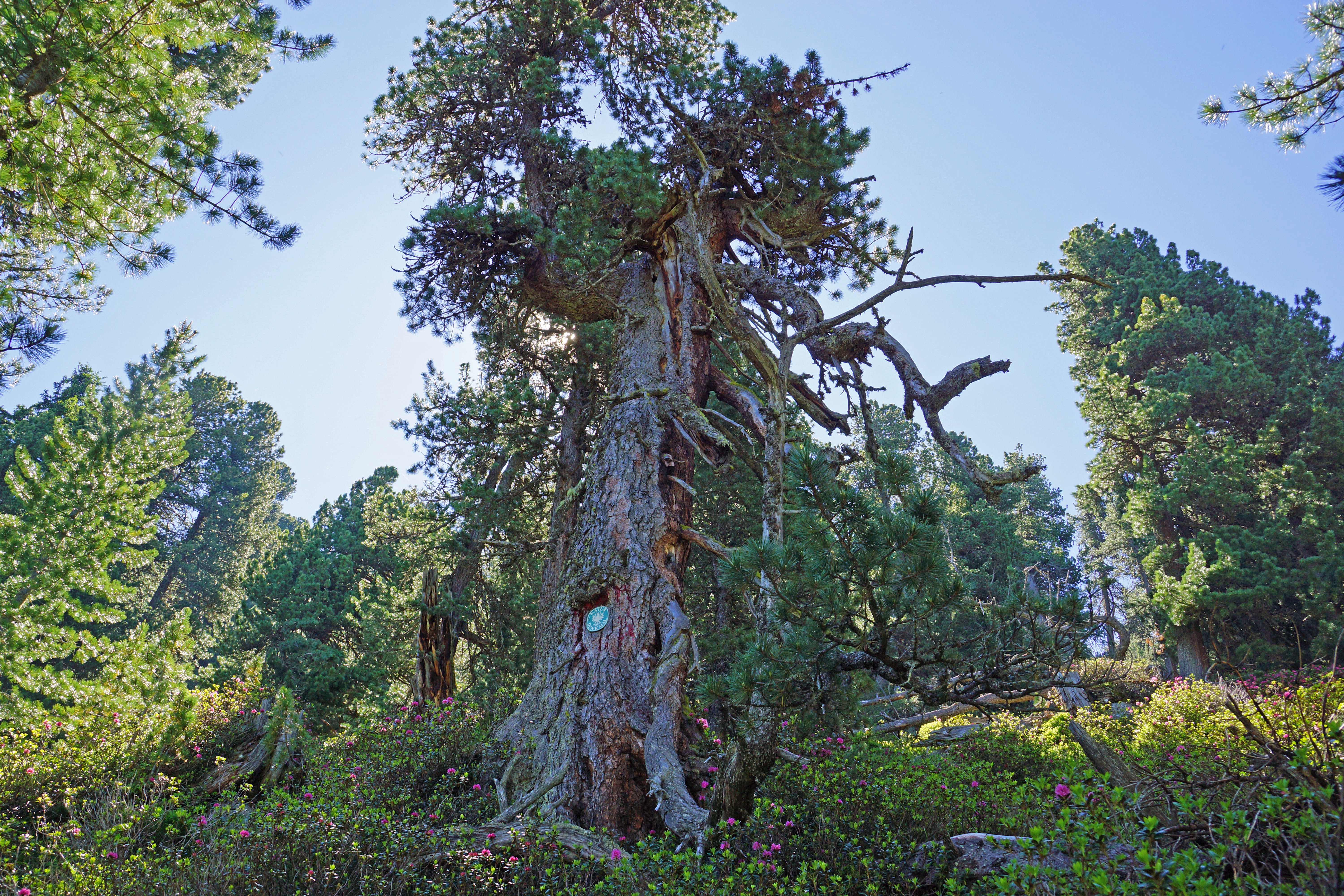 Der älteste Baum in Tirol